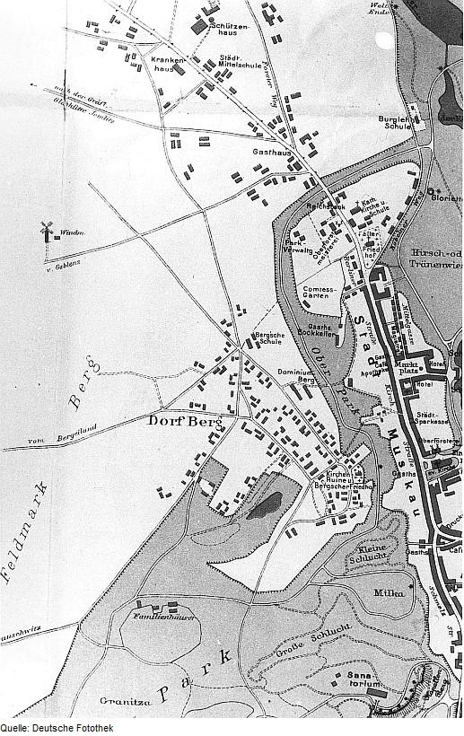 Original image description from the Deutsche Fotothek Bad Muskau-Berg. Plan von Berg, Ausschnitt aus: Fremdenführer durch Stadt und Park Muskau, 1926